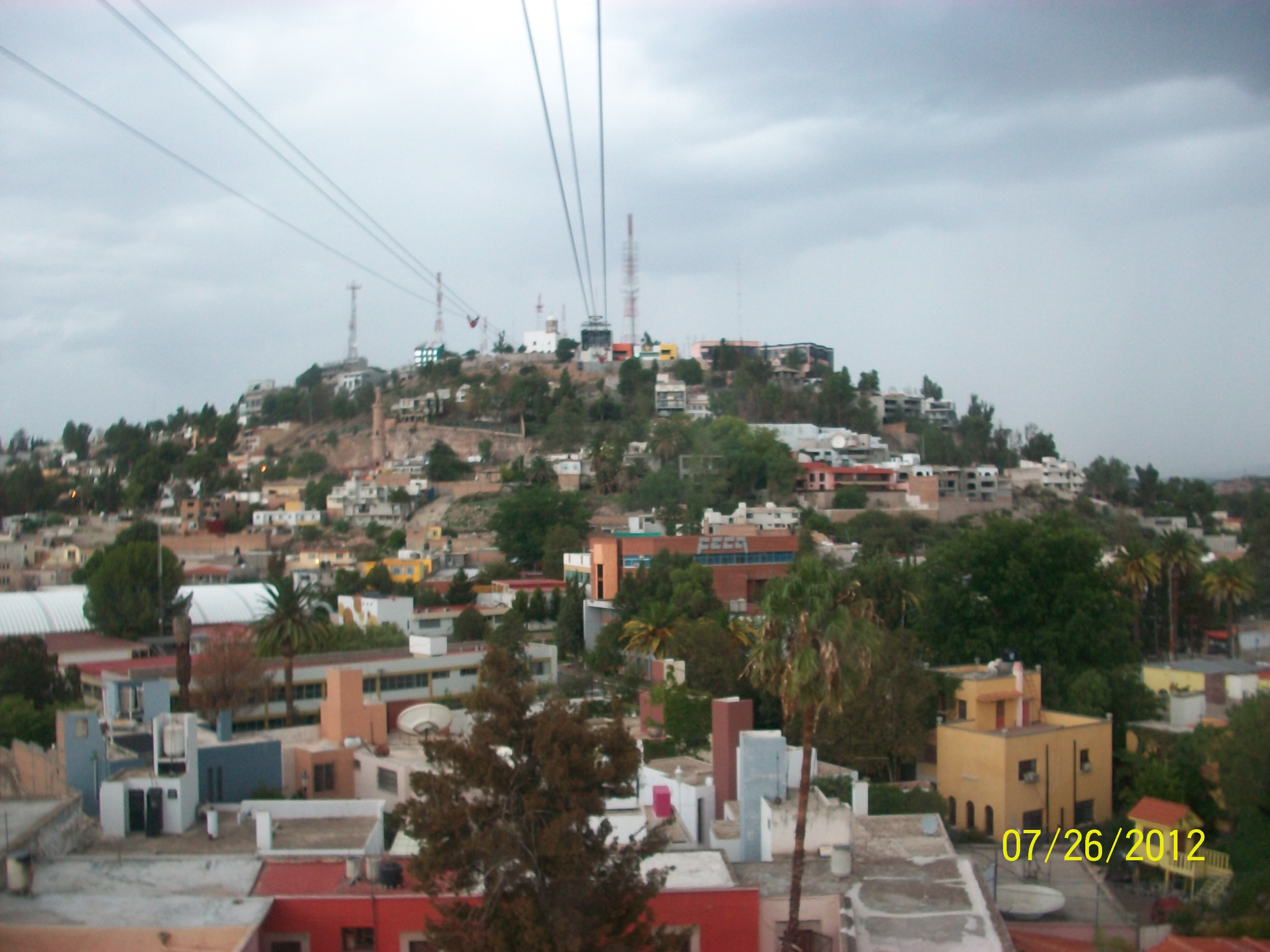 Barrio del Guadiana,Teleferico.